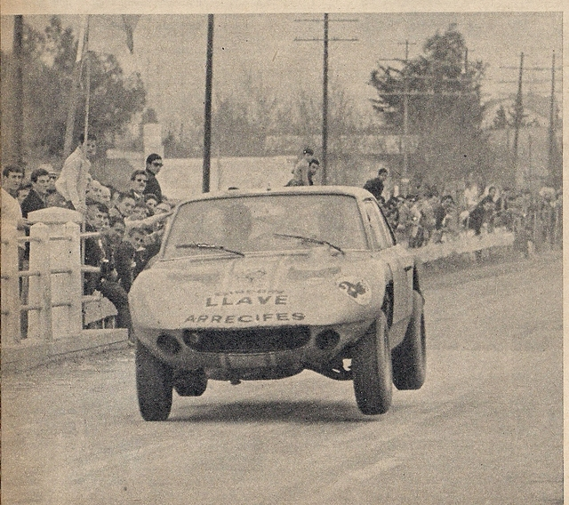 Imagen del prototipo Liebre MKI Torino del piloto Luis Rubén Di Palma.